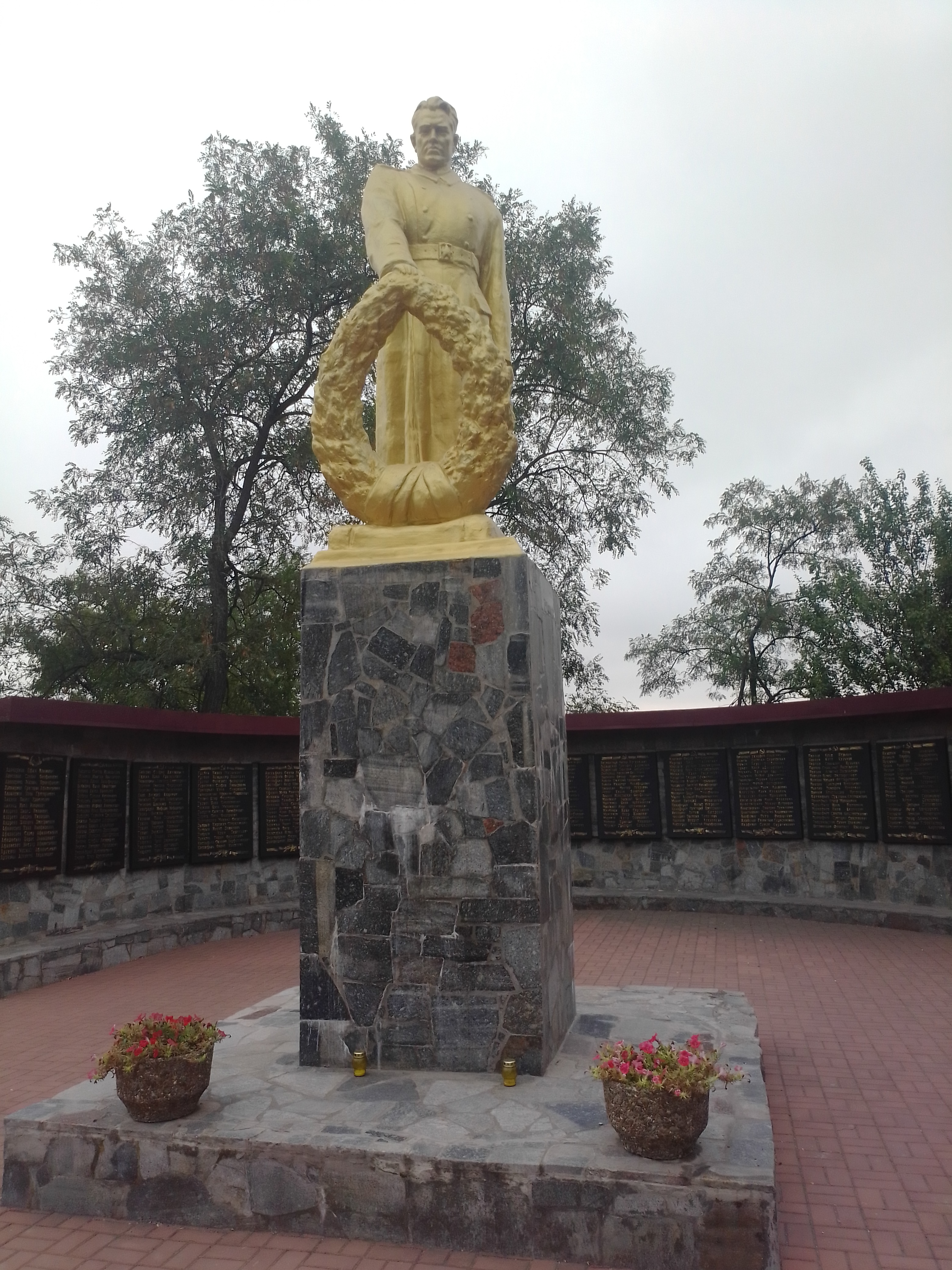 Братська могила радянських воїнів, які загинули в боях за с. Сурсько-Литовське у серпні 1941 і жовтні—листопаді 1943. Поховано 43 особи, Сурсько-Литовське, біля будинку культури